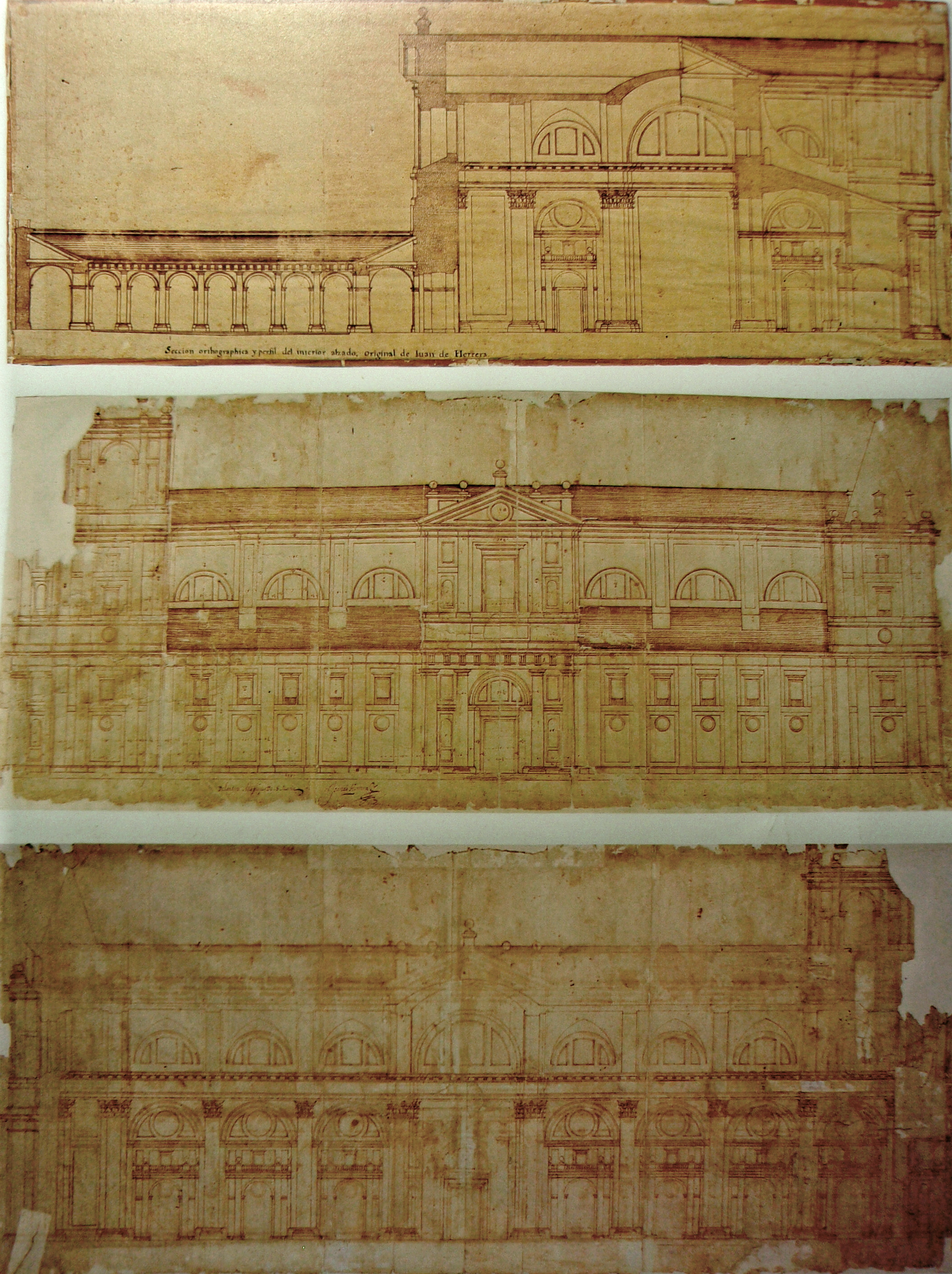 Plnos originales de Juan de Herrera para la Catedral de Valladolid: Sección transversal con el claustro dórico y el crucero, alzado lateral este y sección longitudinal por el eje de la nave mayor.